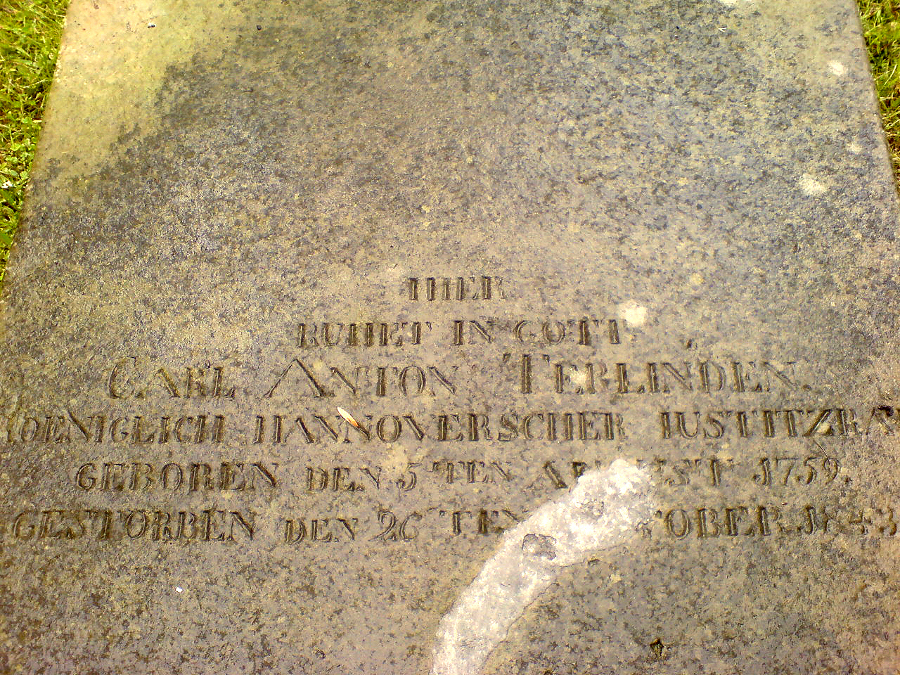 Döhrener Friedhof in Hannover: Inschrift auf dem Grabstein von Carl Anton von Terlinden, Königlich Hannoverscher Justizrat ...